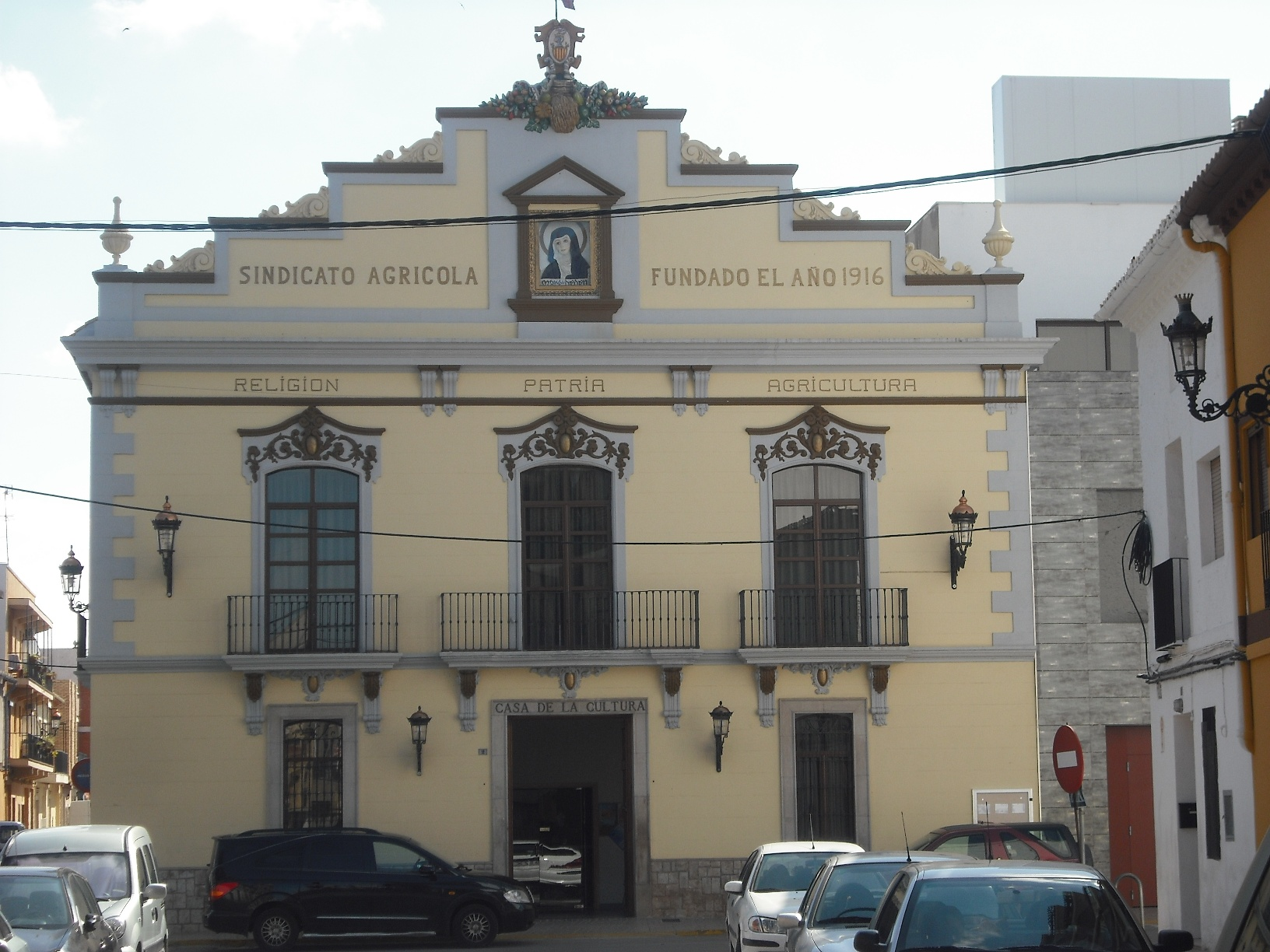 El Sindicat.